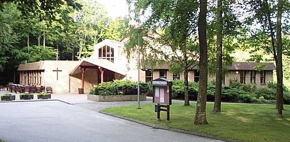 Listerkyrkan i Hällevik